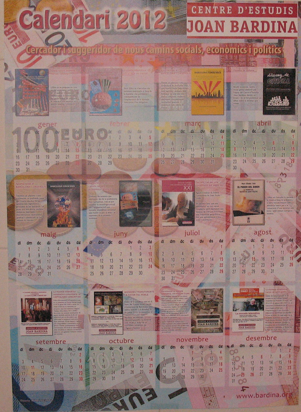 Calendario 2012 del Centro de Estudios Joan Badina